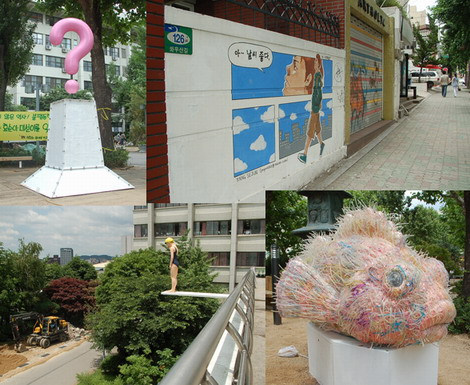 홍익대학교 거리미술전